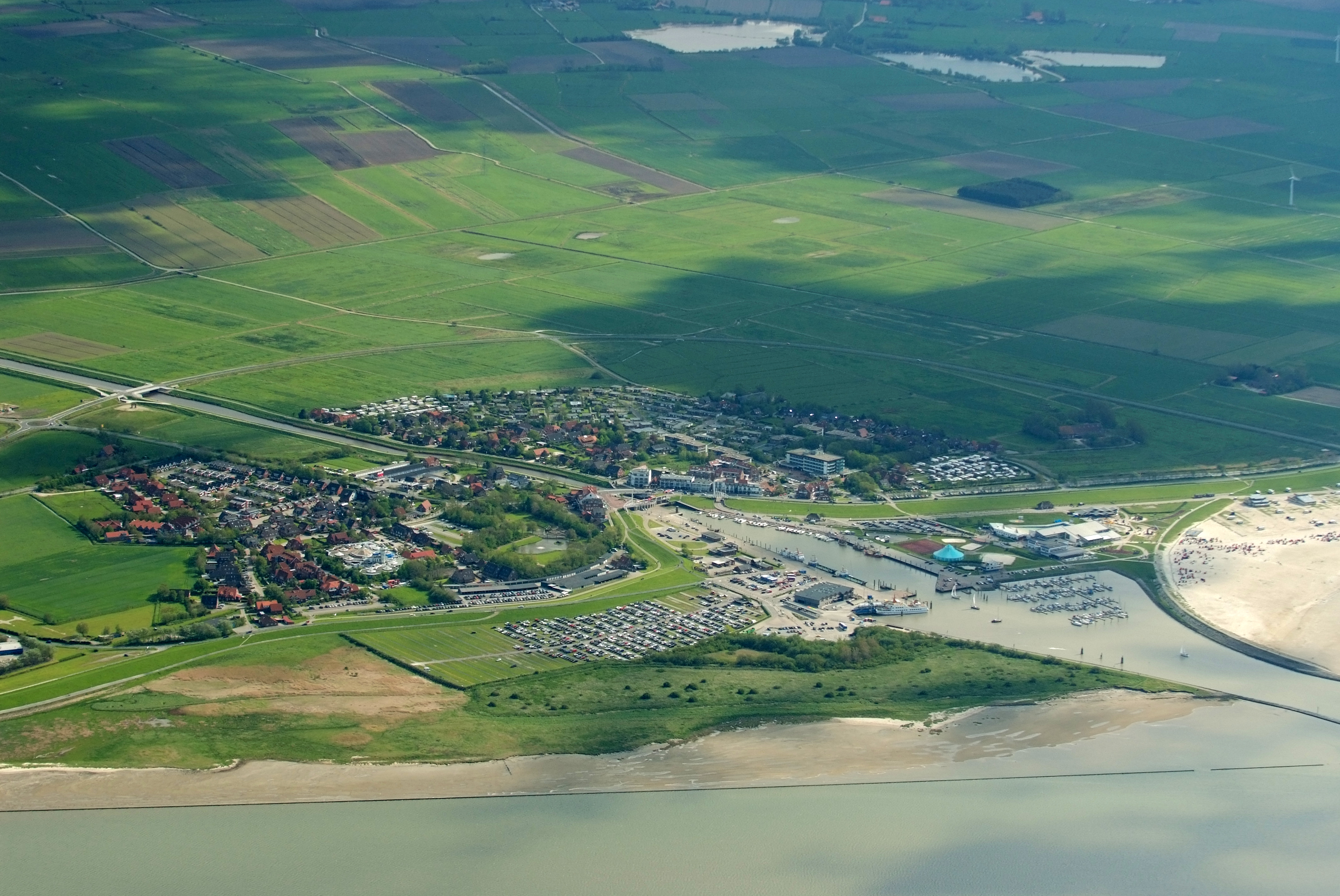 Fotoflug vom Flugplatz Nordholz-Spieka über Bremerhaven, Wilhelmshaven und die Ostfriesischen Inseln bis Borkum Bensersiel